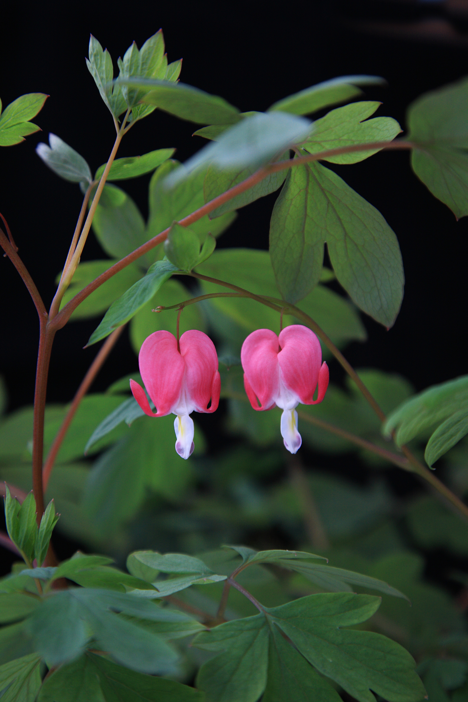 Dicentra spectabilis